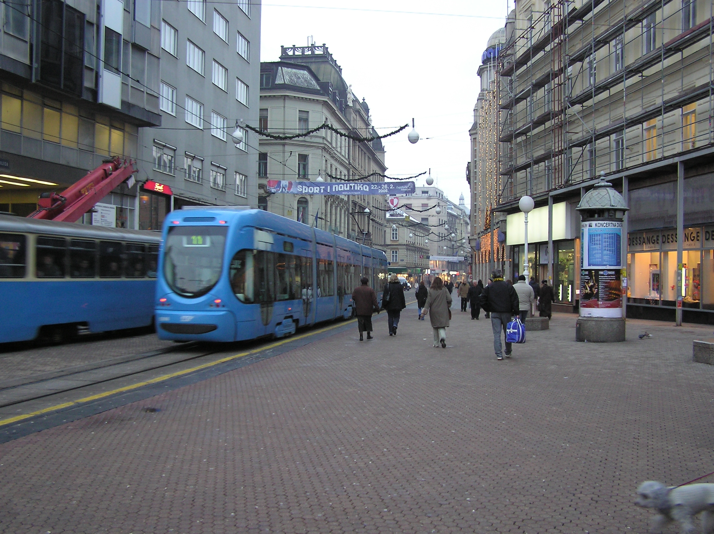 Tram in Zagreb.